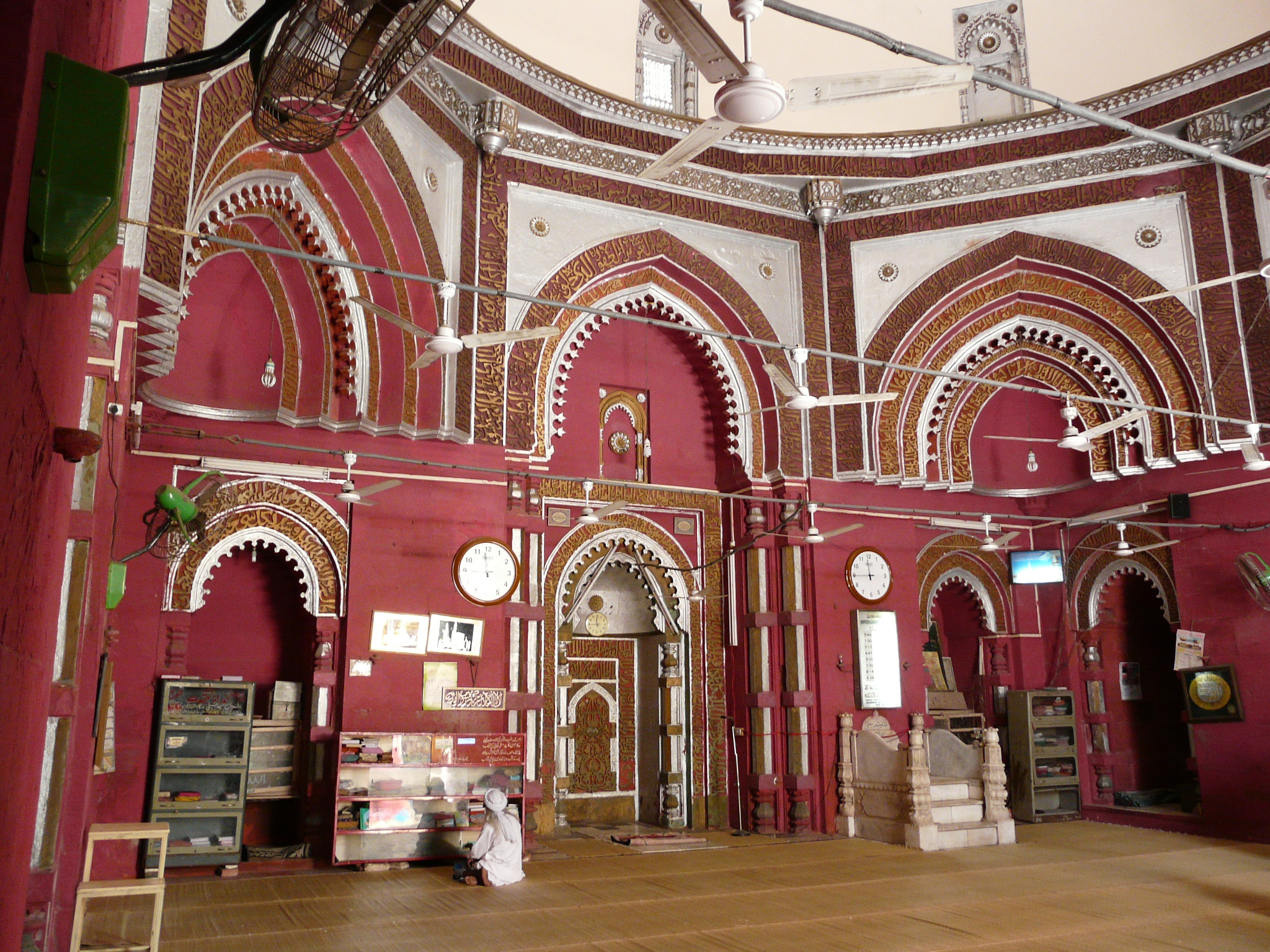 Mosque mhirab